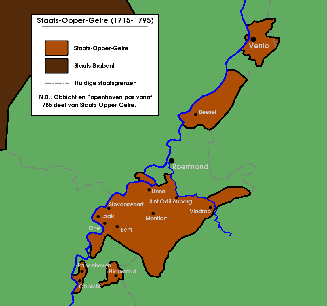 Kaart van Staats-Opper-Gelre na het sluiten van het Barrièretractaat in 1715. Obbicht en Papenhoven werden hieraan toegevoegd ten gevolge van het Verdrag van Fontainebleau in 1785.